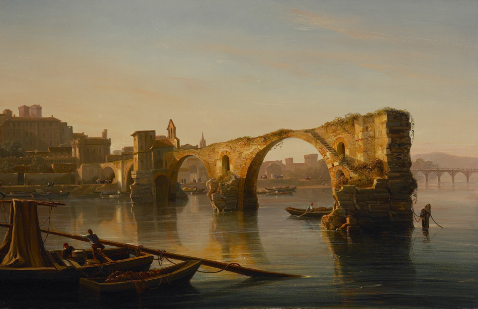 Isidore Dagnan: Le pont d'Avignon / Die Brücke von Avignon.